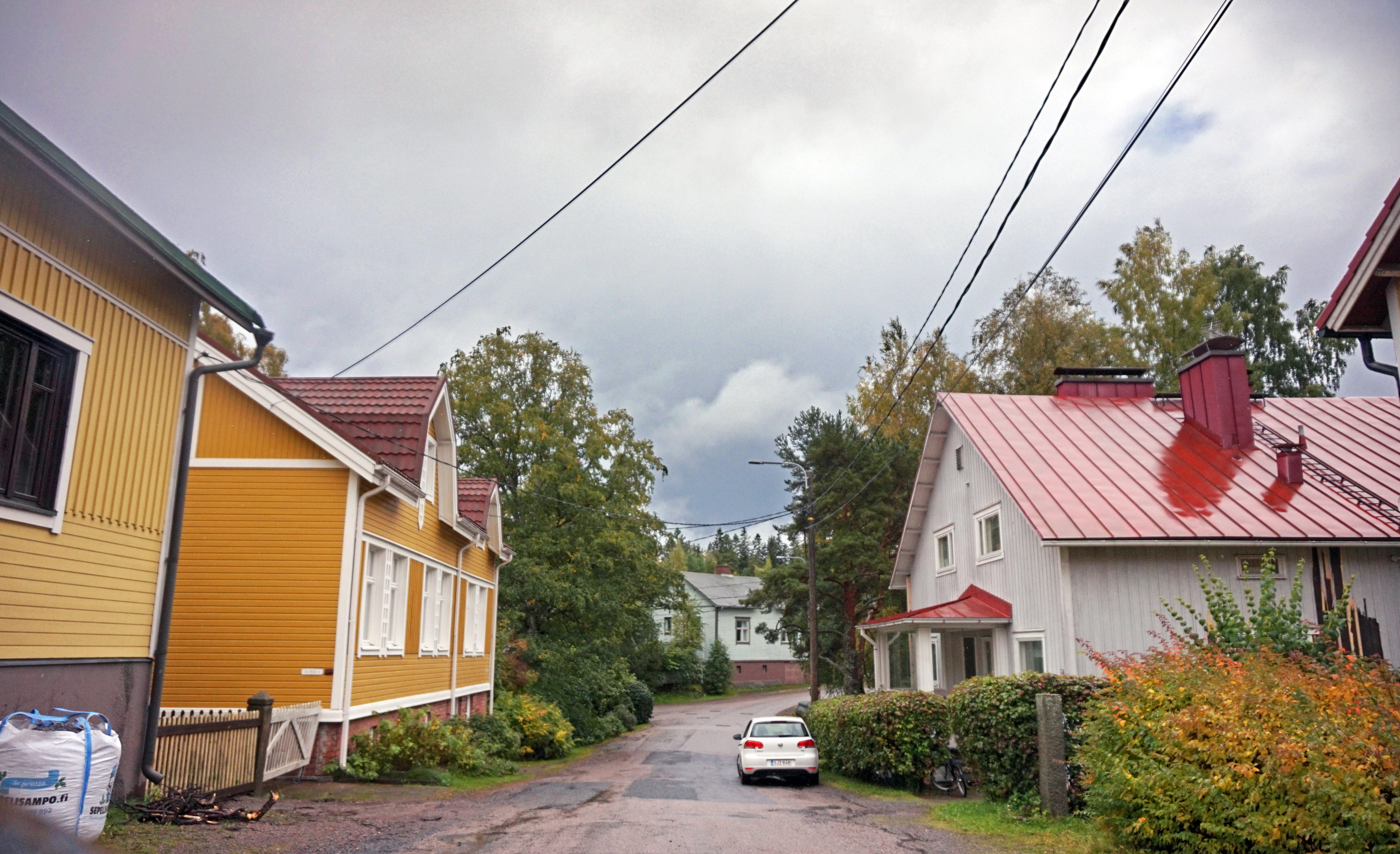 Aaltotie Käpylässä Lapin kaupunginosassa Tampereella.